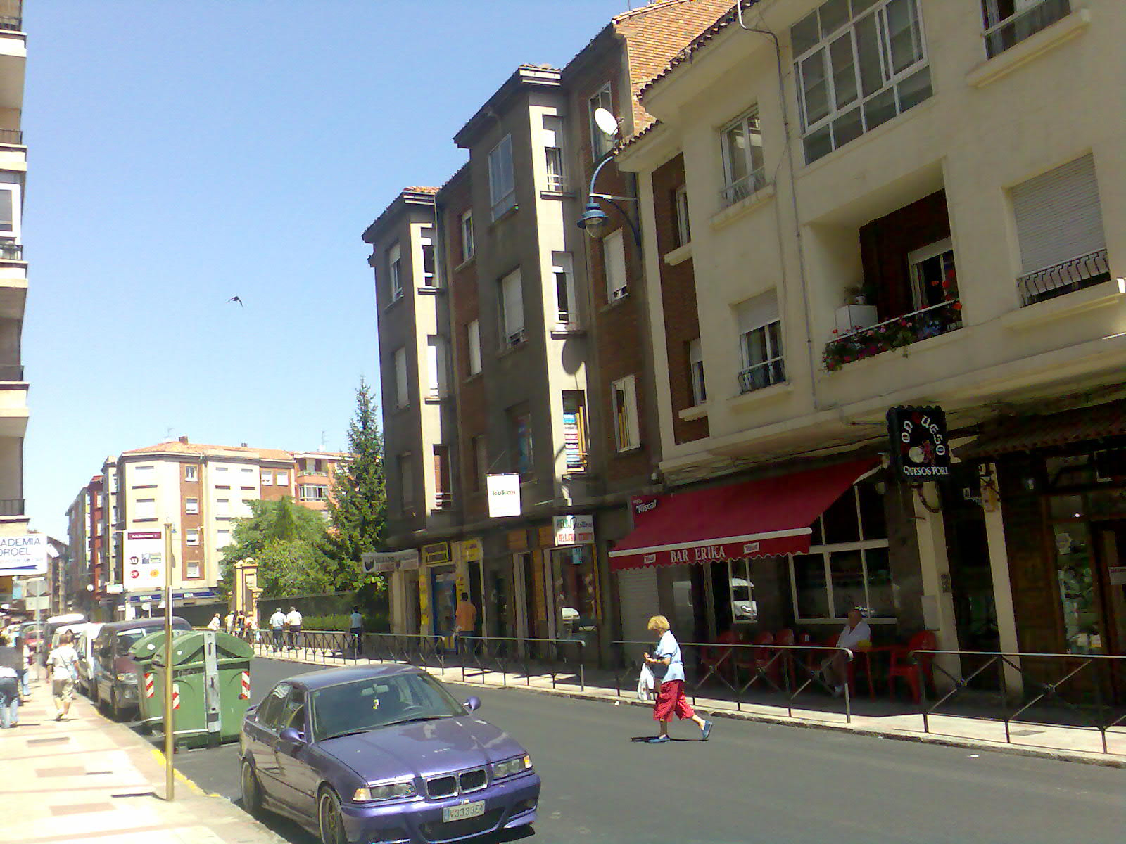 Avenida de San Mamés en León.